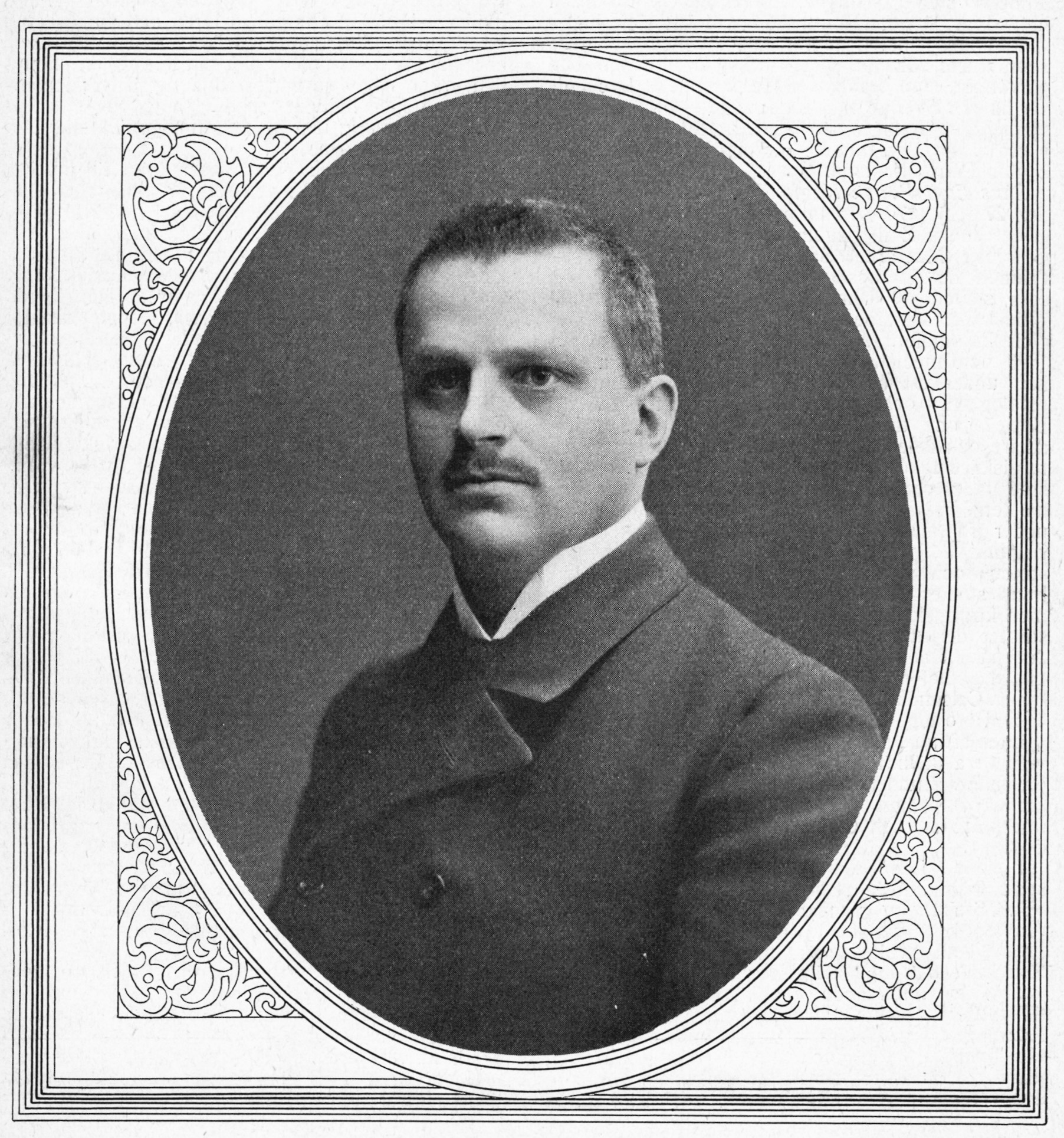 Patrik Haglund (1870-1937) på omslaget till Hvar 8 Dag 1912.